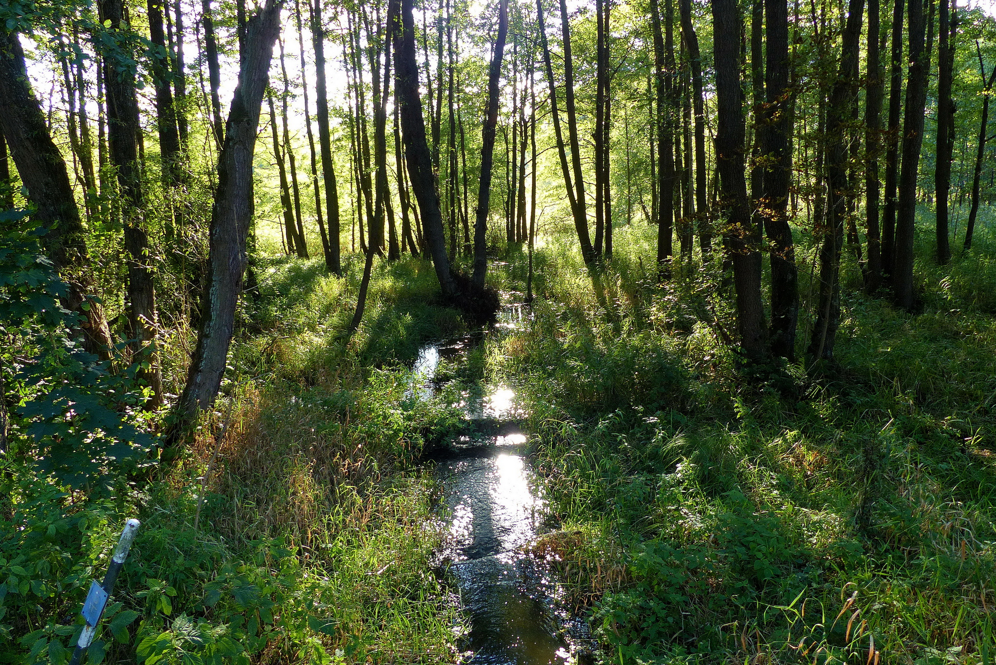 Svébořický potok ve Hvězdově.